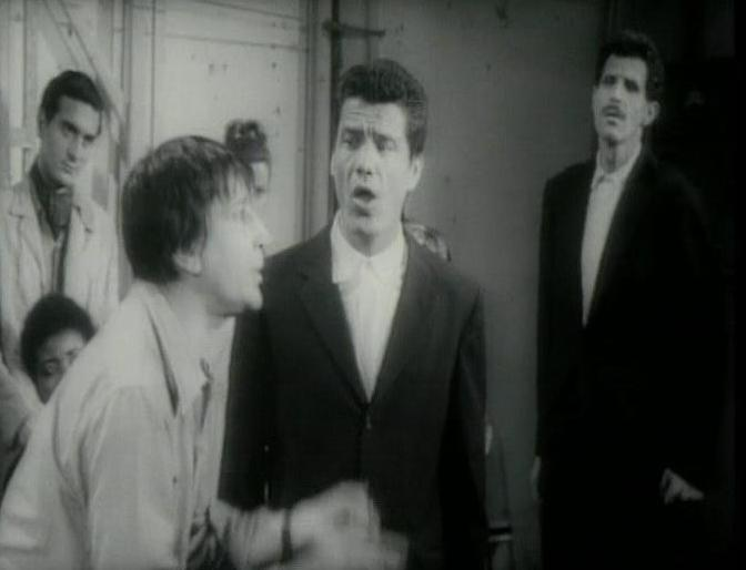 Alberto Bonucci e Franco e Ciccio nell'episodio "I promessi sposi"